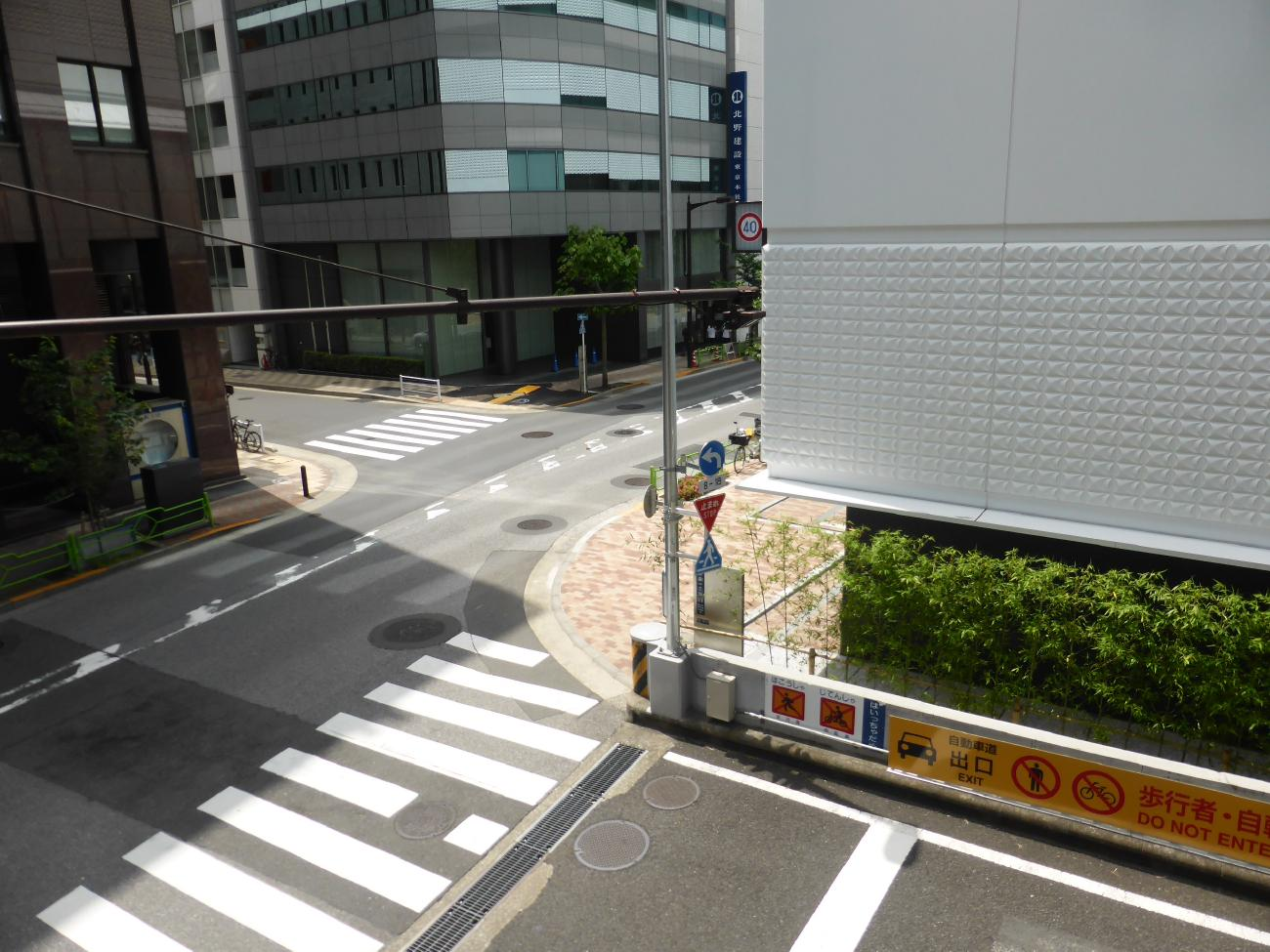 東銀座出口斜め前にソロモン名誉領事館